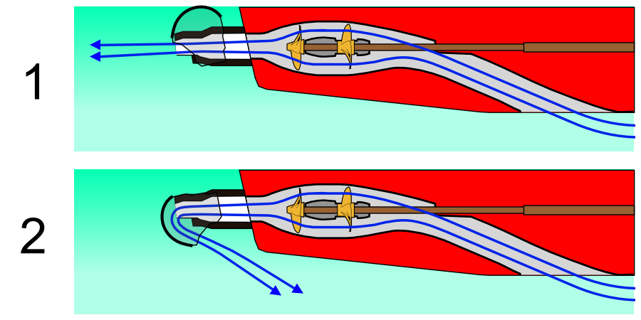 Hydrojet scheme 1- Ahead 2- Astern